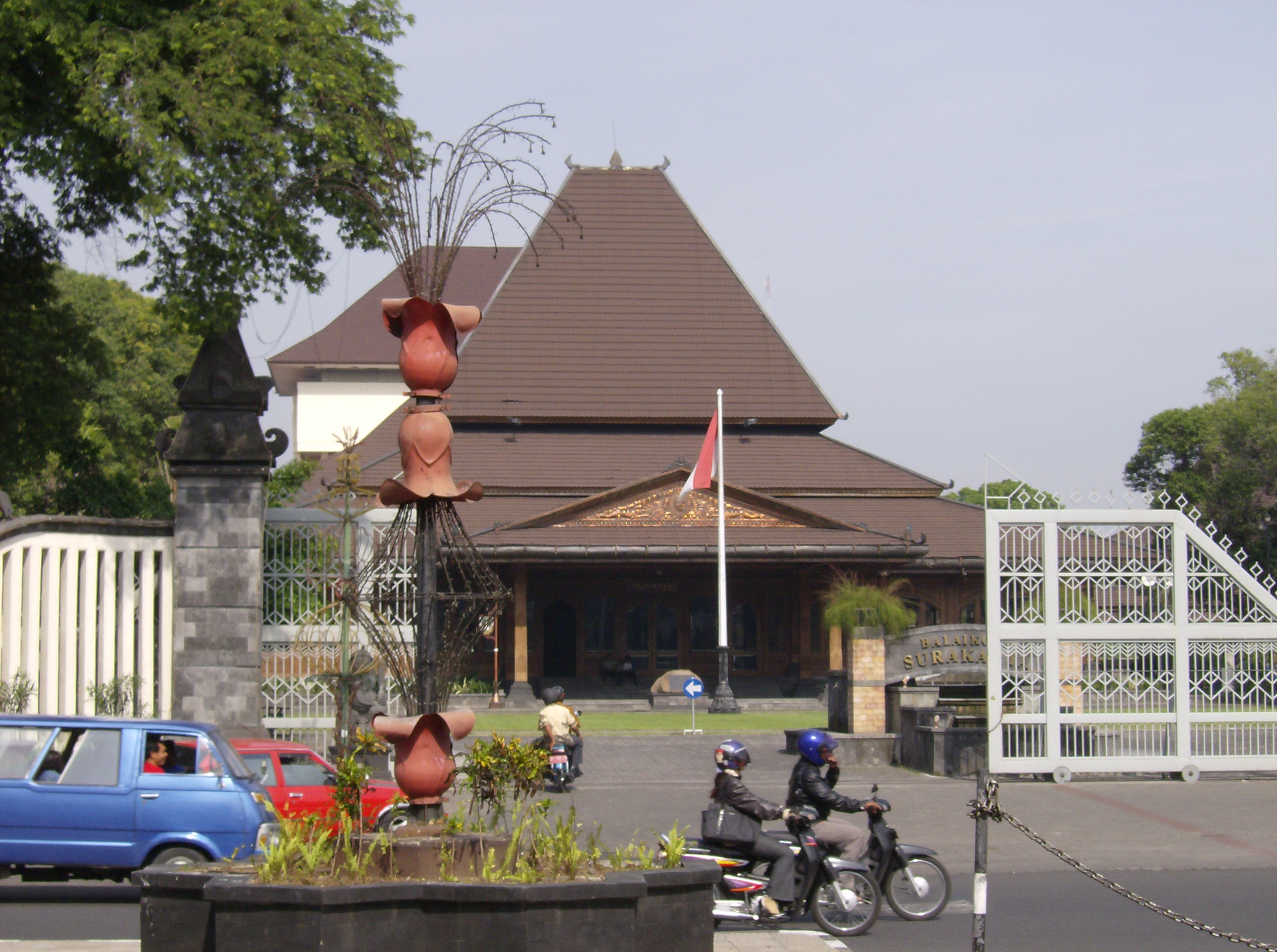 Made by Meursault2004 aka Revo Arka Giri Soekatno